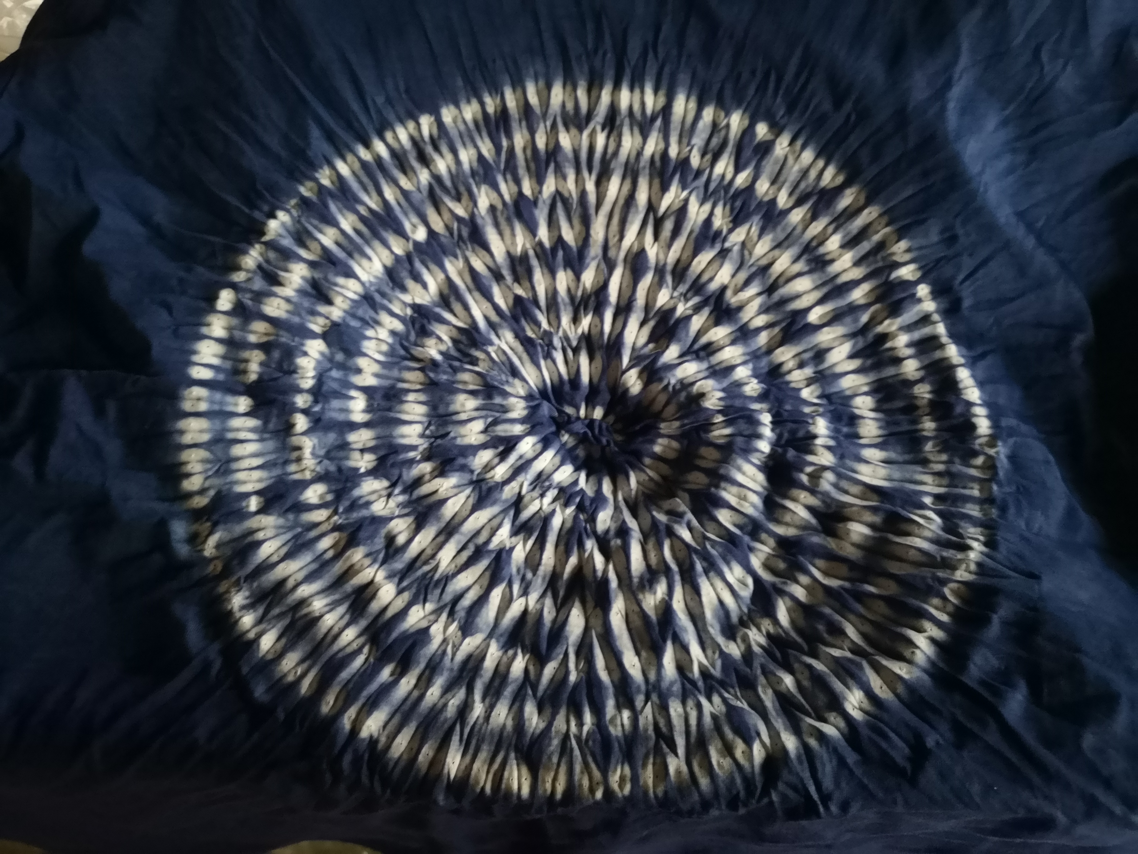 有松絞りの平縫い絞り、唐松模様。染色後、糸抜きをして、湯のし前の状態。素人の手による絞り体験作品。